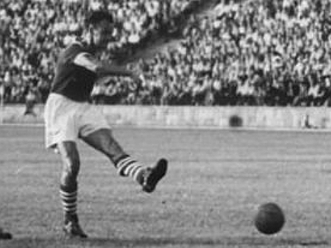 Title: Empor Rostock - Dynamo Berlin 1:0 Factual corrections and alternative descriptions are encouraged separately from the original description. Additionally errors can be reported at this page to inform the Bundesarchiv. Original historic description: Zentralbild-Müller Bey-Ku 7.7.1957 Empor Rostock schlug Dynamo Berlin - Am Sonnabend, dem 6.7.1957, fand im Rostocker Ostseestadion das Fußball-Meisterschaftsspiel zwischen Empor Rostock und Dynamo Berlin statt. Durch eine 0:1-Niederlage erlitt der Tabellenführer Dynamo die erste Niederlage dieser Saison. UBz.: Der Berliner Spieler Maschke (2.v.lk.) schießt auf das Rostocker Tor. Der Ball prallte aber an den Abwehrspielern Zapf (Nr. 3) und Minuth (links daneben) ab.